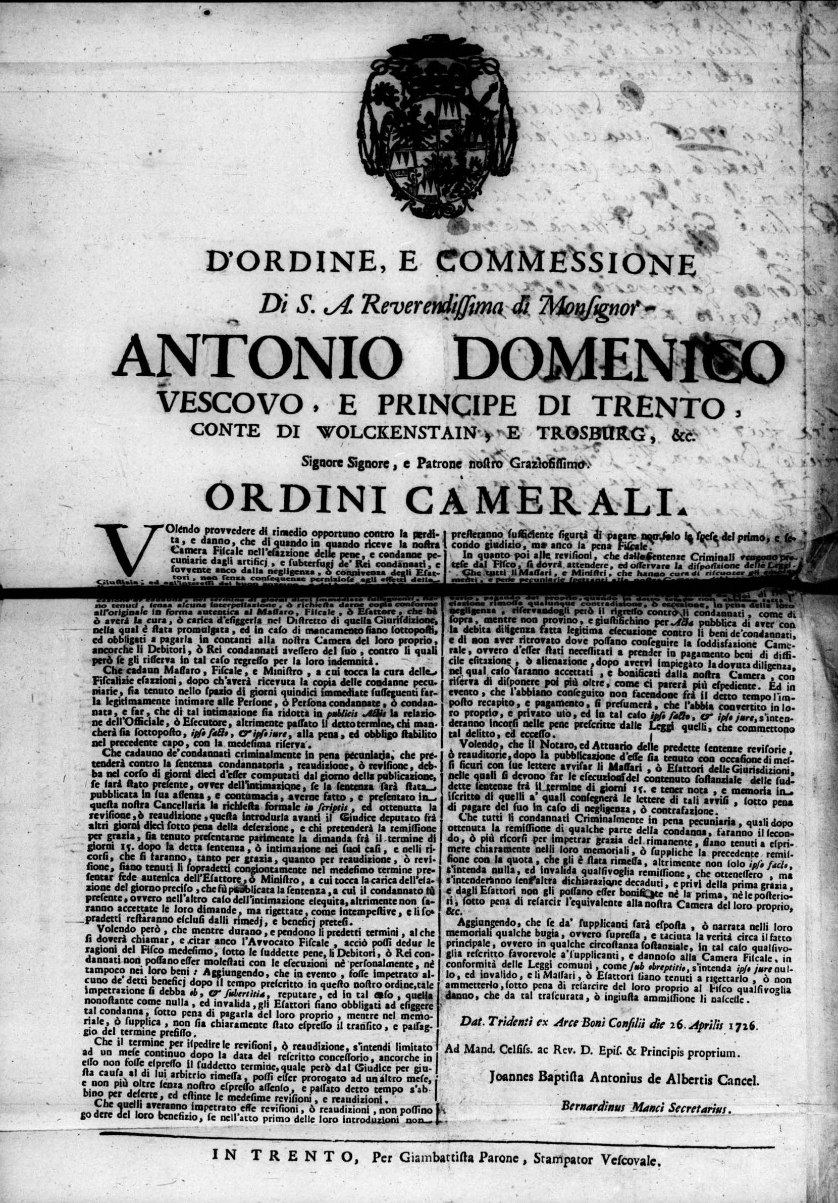 carta